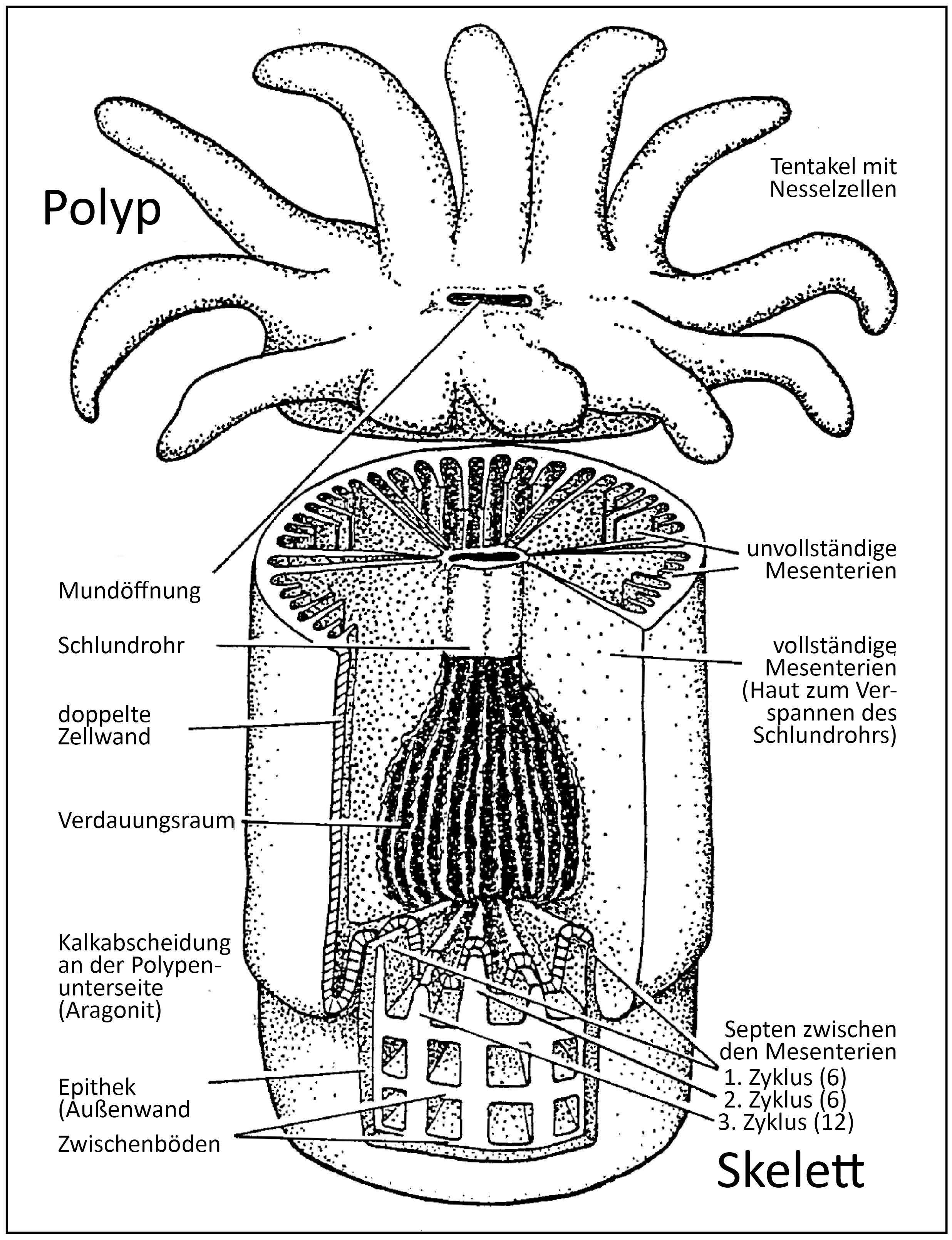 Korallenpolyp mit Kalkskelett